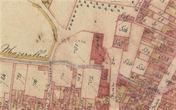 L'église Saint-Antoine de Loches (bâtiment isolé au centre de l'image) sur le cadastre napoléonien.